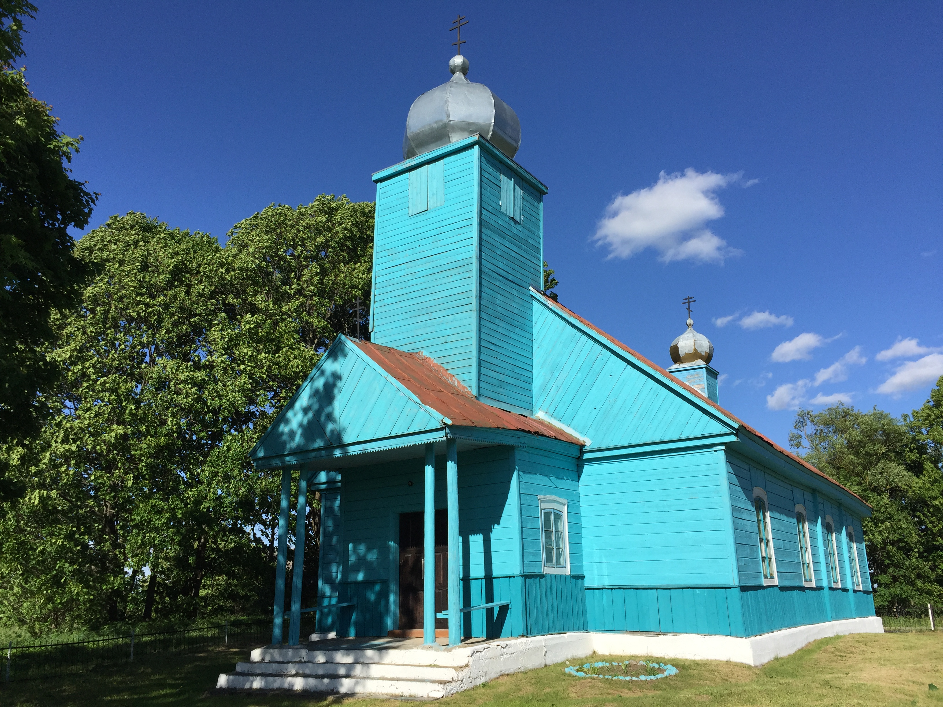 Апидомская старообрядческая церковь